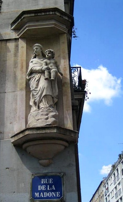 Statue de la Vierge à l'Enfant rue de la Madone à Paris, 18e arrondissement.